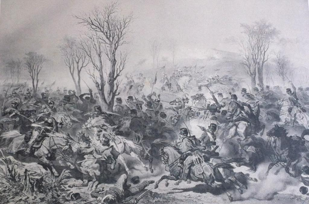 Piemonte Reale Cavalleria al Combattimento della Sforzesca - Cartolina Reggimentale dall'opera di Stanislao Grimaldi del Poggetto. I Cavalieri di Piemonte caricano dalla sinistra dell'immagine contro gli Usseri Austro-Ungarici